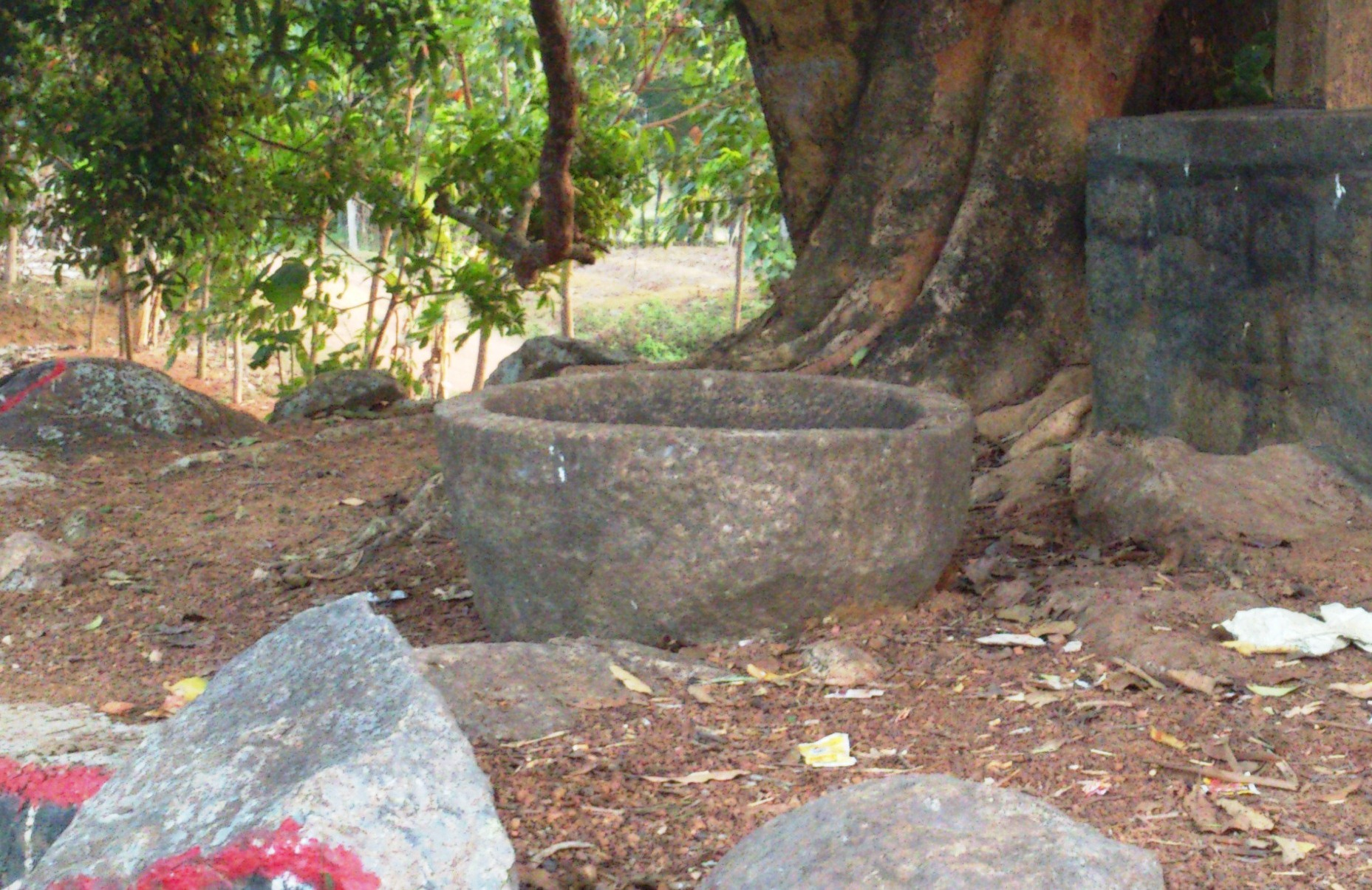 കൽത്തൊട്ടി ആറ്റുവാശ്ശേരിയിൽ നിന്നും.